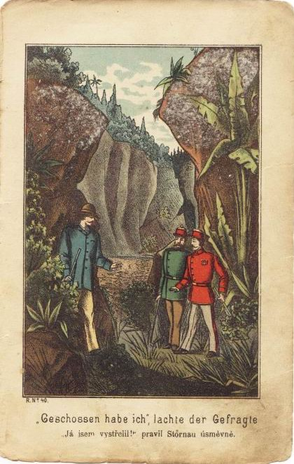 Ilustrace z prvního českého vydání